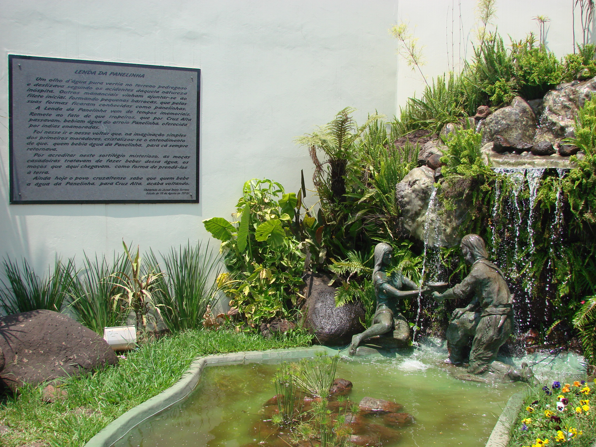 Placa da Lenda da Panelinha junto ao Monumento.